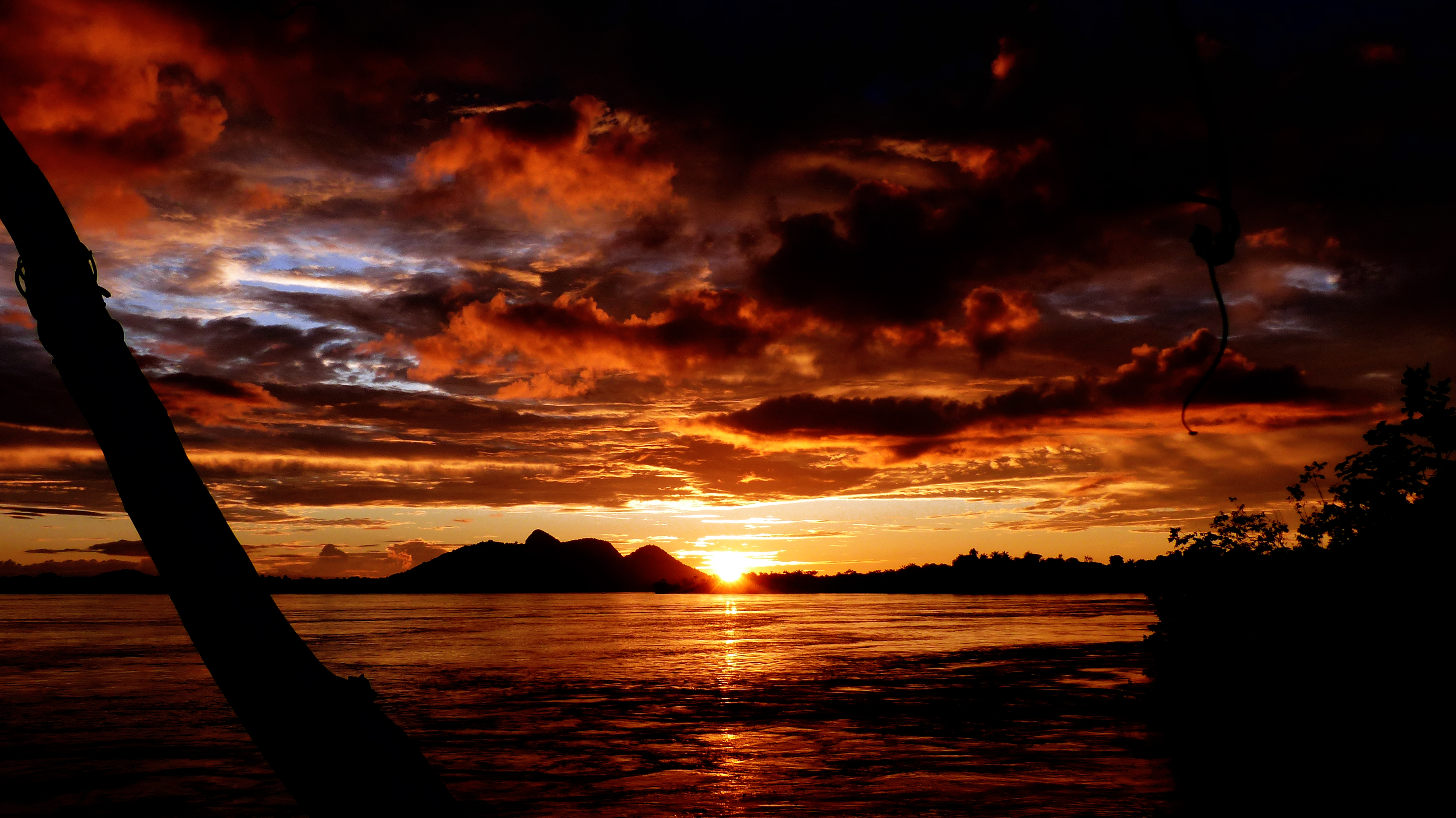 Sunset feito por mim vista da cidade de São Gabriel da Cachoeira, Amazonas Brasil